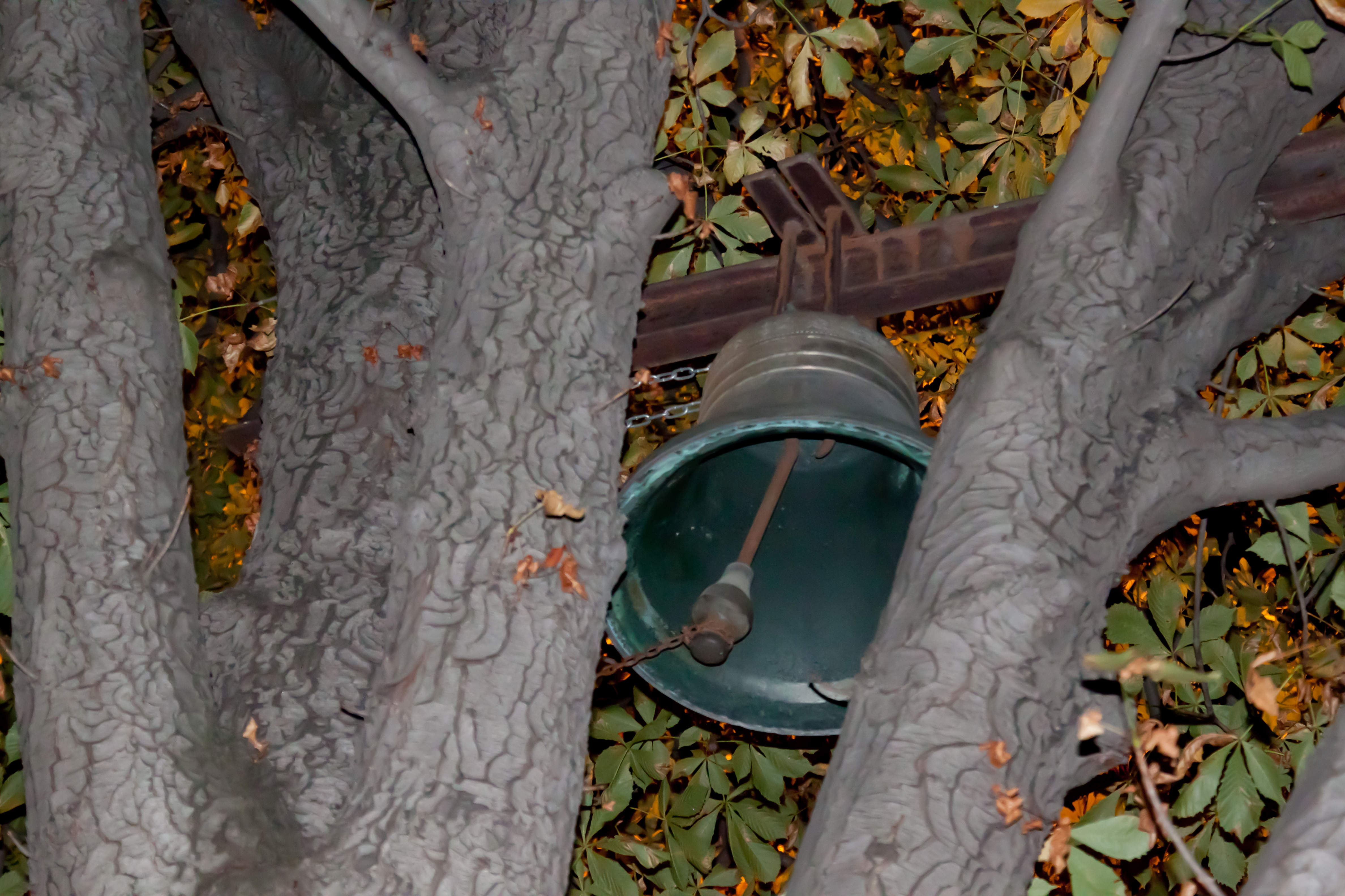 Stadtzentrum Sofia; Rundgang durch das Stadtzentrum, kostenlos, in englisch, täglich 11 und 18 Uhr ab große Treppe des Justizpalastes; gesamte Zentrum; bis Parlament, zwei Stunden; Trinkgelder willkommen, ; die Kirche Sveta Sofia lag seinerzeit vor den Toren des antiken Serdica, hier führt die Straße zum Markt nach Serdica vorbei, die Kirche war namensgebend für die Stadt. Die Kirche hat keinen Glockenturm (mehr?), aber eine Glocke (wie es sich gehört). Die Glocke hängt in einem Baum direkt vor dem Eingang der Kirche. In Griechenland, in Monolithos hängt auch die Kirchenglocke vor der Kirche im Baum. Auch in Asinou (Zypern) - siehe File:Asinou - Kirche Glocke im Baum 2.jpg . Ebendo bei der Kirche Panagia Ekatontapiliani in Parikia/Paros. Baum als Glockenturm.